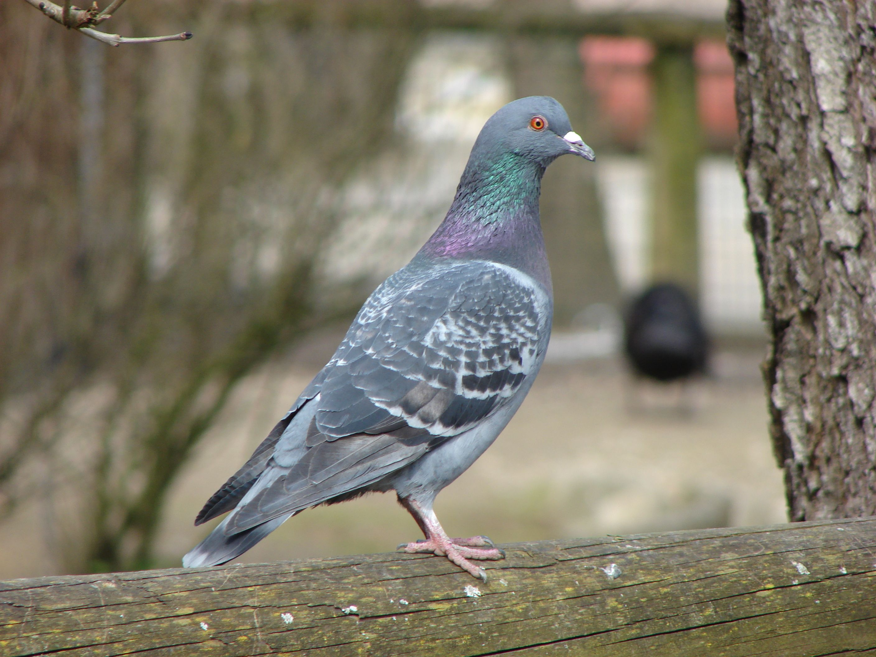 Columba livia